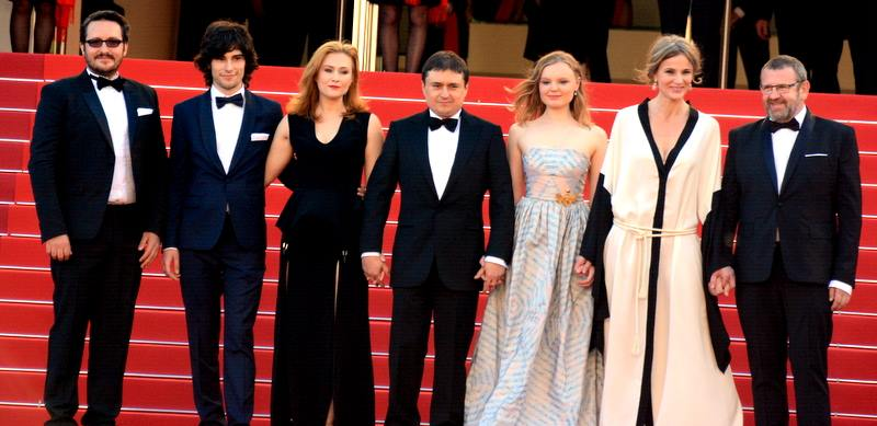 Présentation du film "Bacalaureat" au festival de Cannes